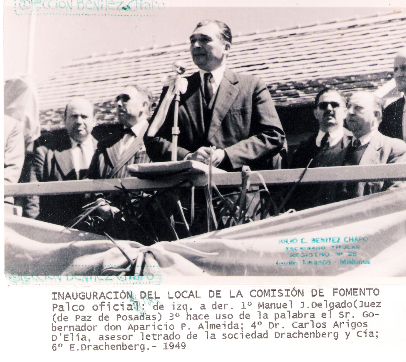 El gobernador del Territorio Nacional de Misiones, Aparicio Almeida, en la inauguración del local de la Comisión de Fomento de Jardín América en 1949. Aparicio Pereyra Almeida ocupó por casi 3 años el cargo de 30° gobernador del antiguo Territorio Nacional de Misiones, desde el 20 de enero de 1947 hasta el 30 de septiembre de 1949.